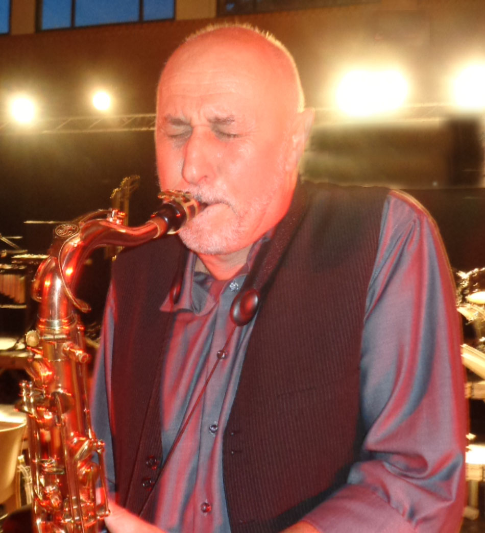 Michel Pellegrino au saxophone en concert 2015